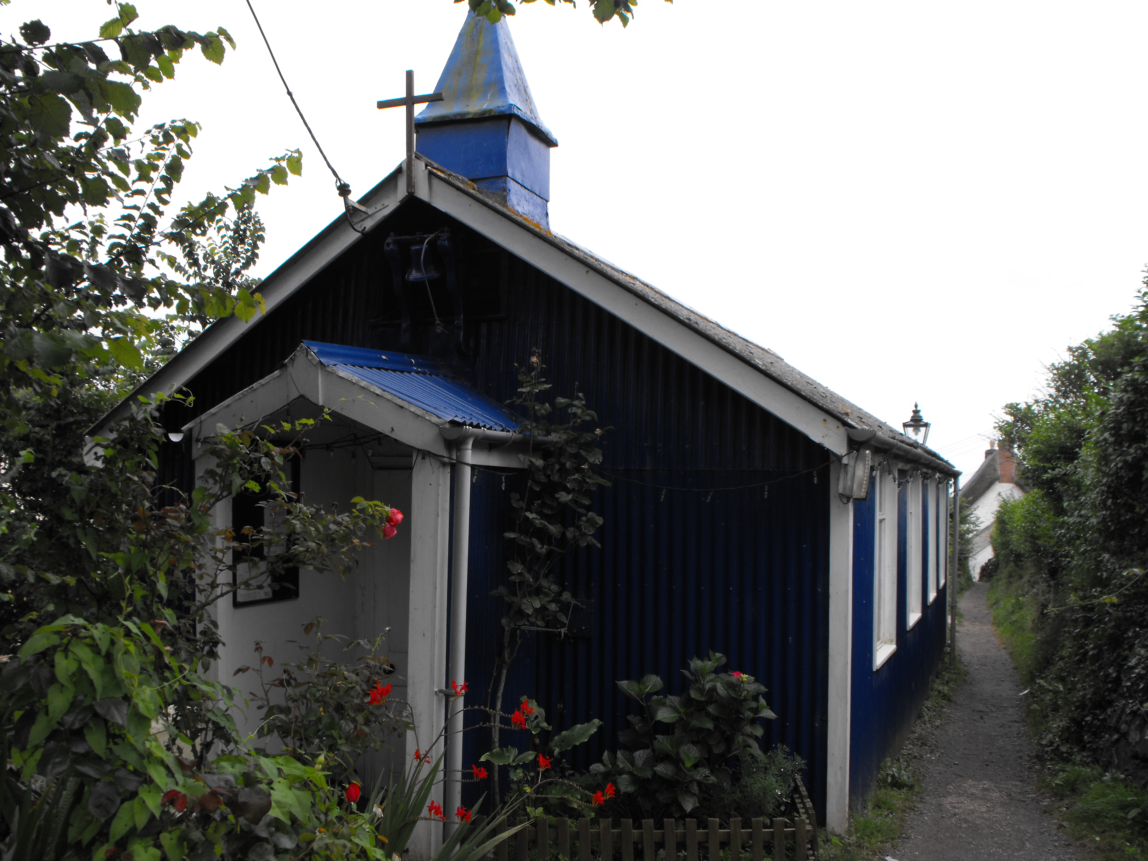 CADGWITH CHURCH